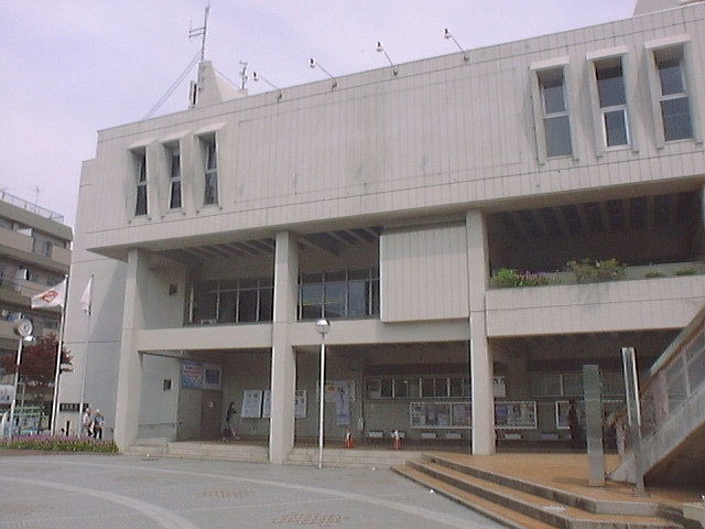 Midori-ku Ward Office, Midori-ku, Yokohama, Kanagawa, Japan (緑区役所)